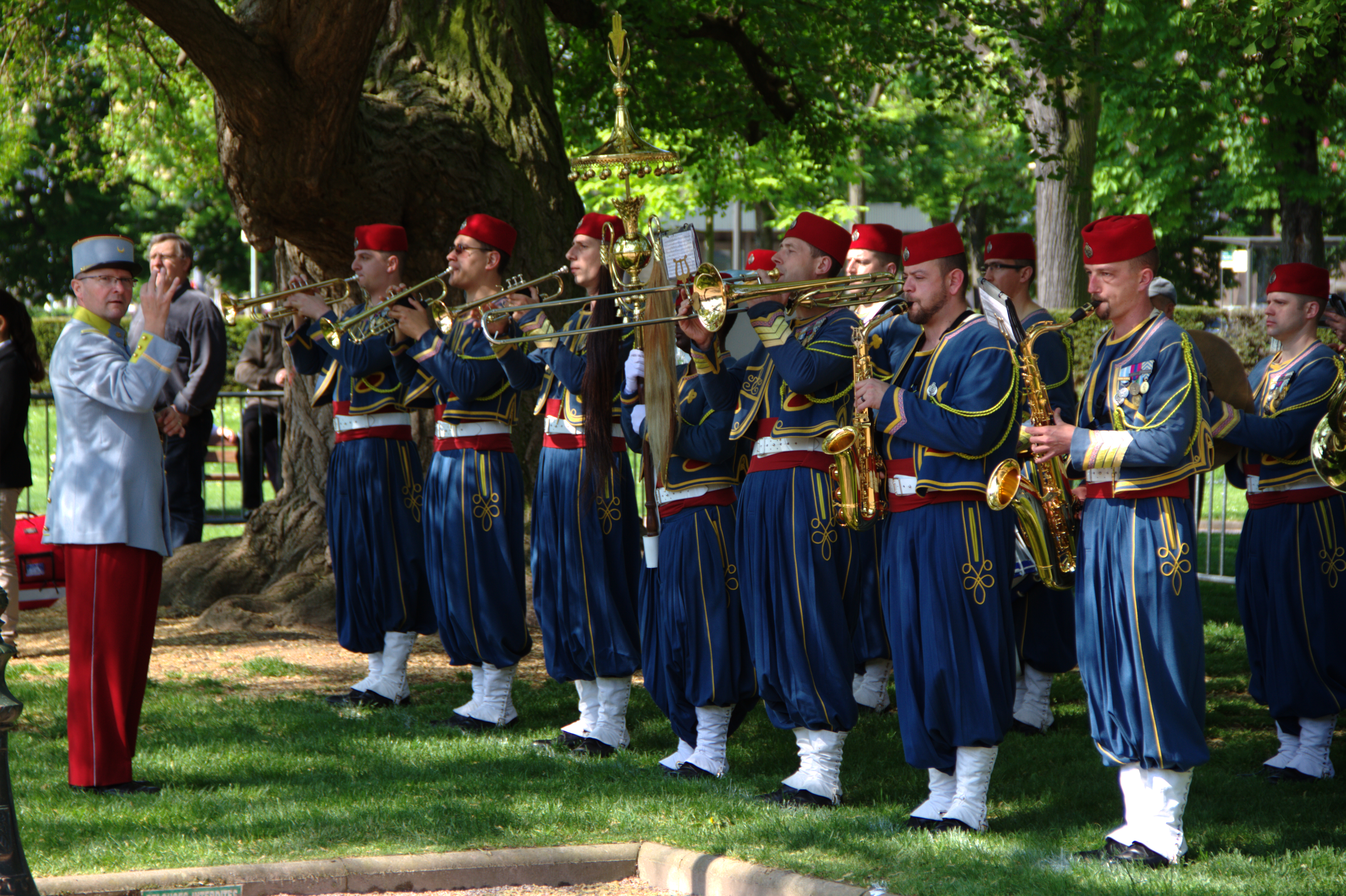 Cérémonie commémorative du 8-mai-1945 Strasbourg, place de la République 8 mai 2013